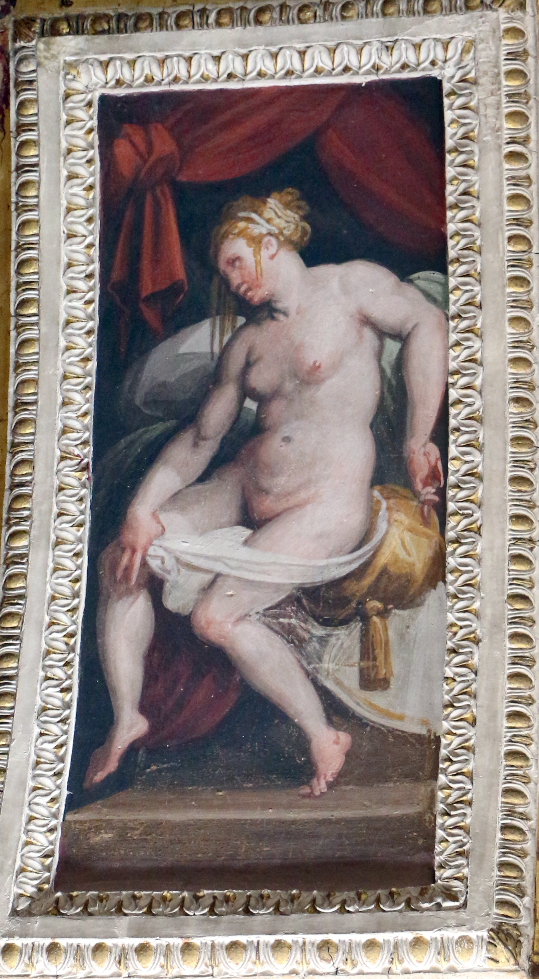 Allegoria del temperamento Flemmatico secondo la dottrina dei quattro umori, affresco di Jacopo Zucchi e del Poppi sul soffitto dello studiolo di Francesco I nel Palazzo Vecchio a Firenze